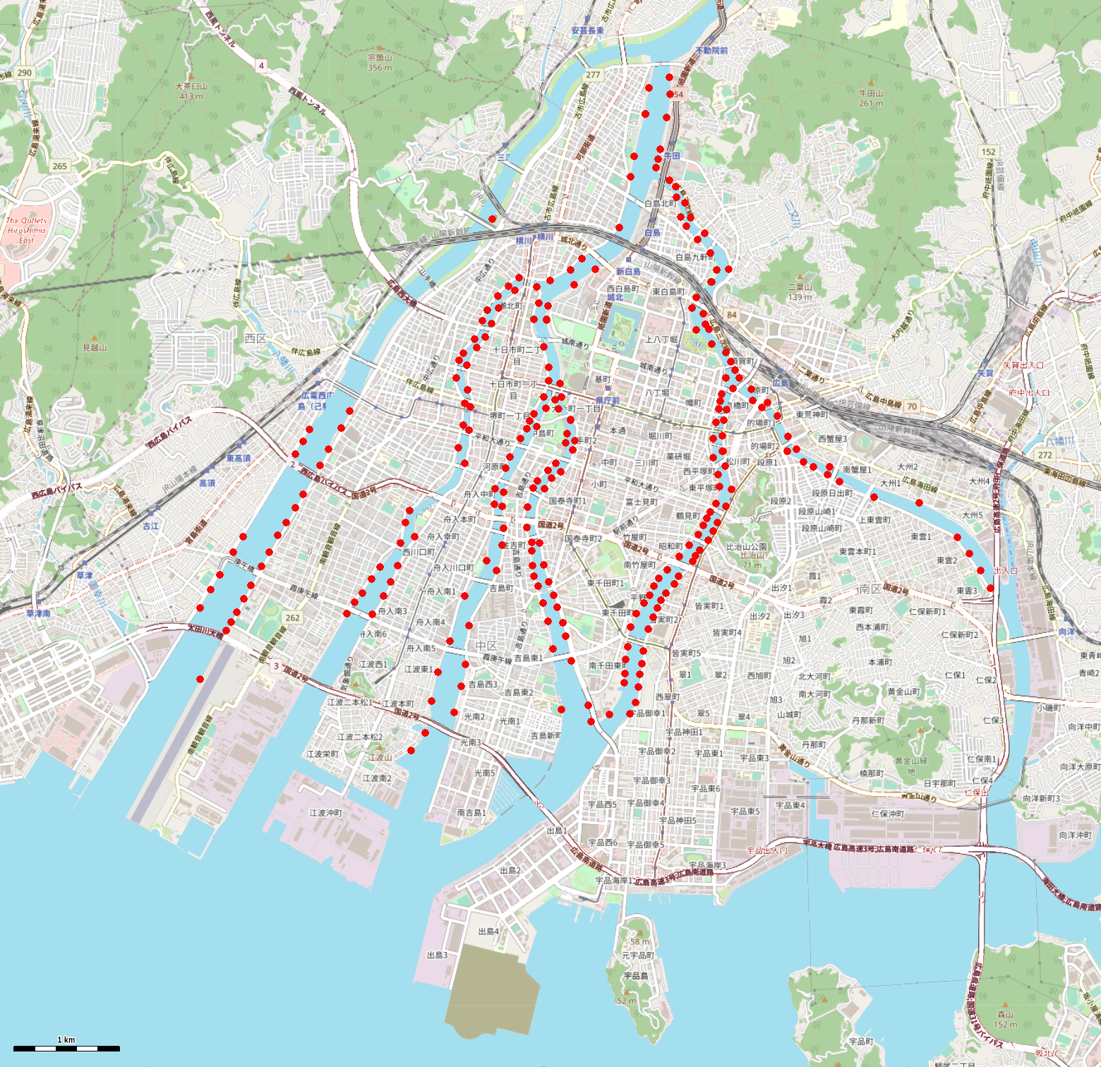 広島市内にある船着場に利用できる雁木の主な分布 This map may be incomplete, and may contain errors. Don't rely solely on it for navigation.